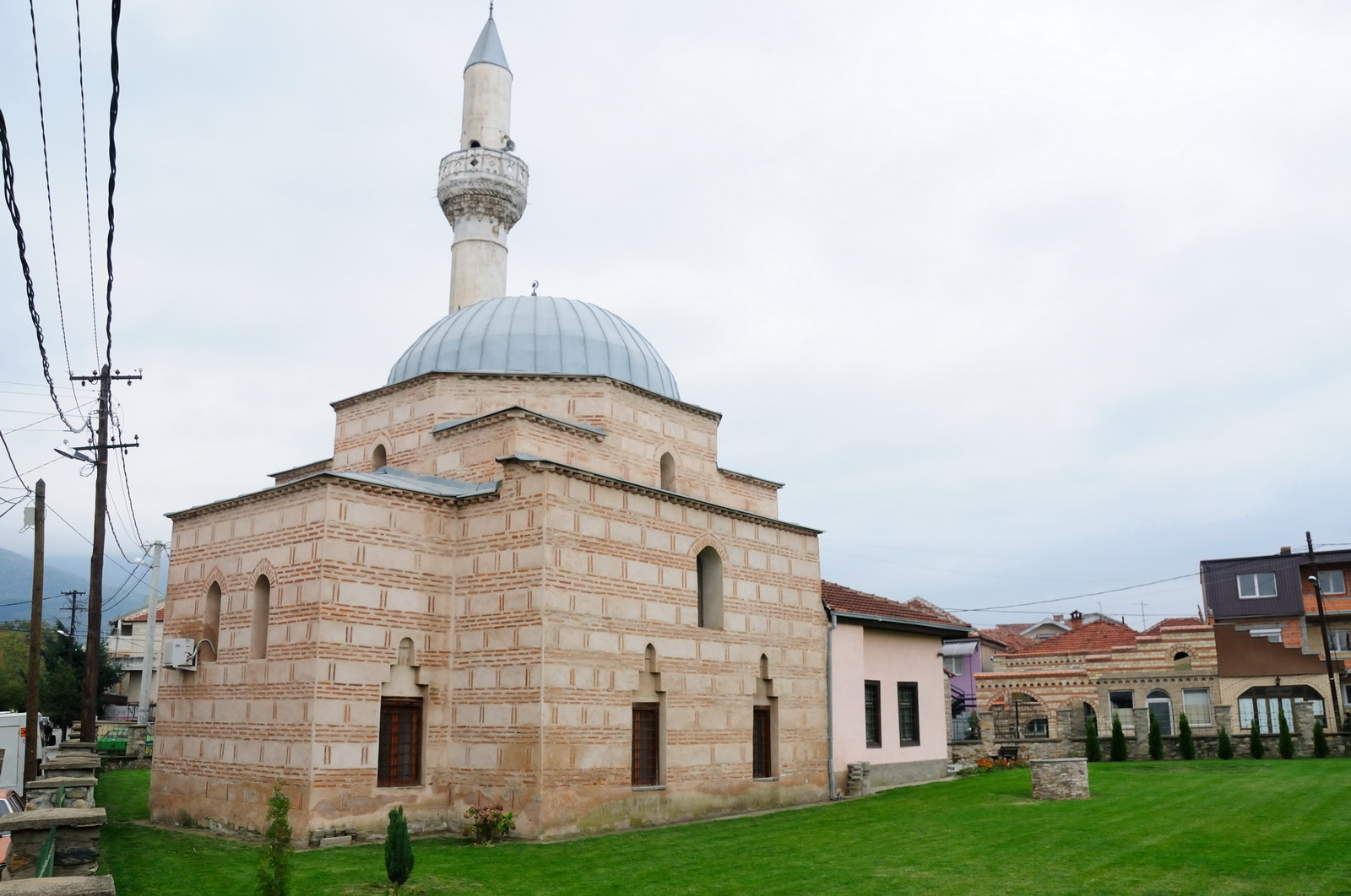 Djamija Hamza Bej-Bitola